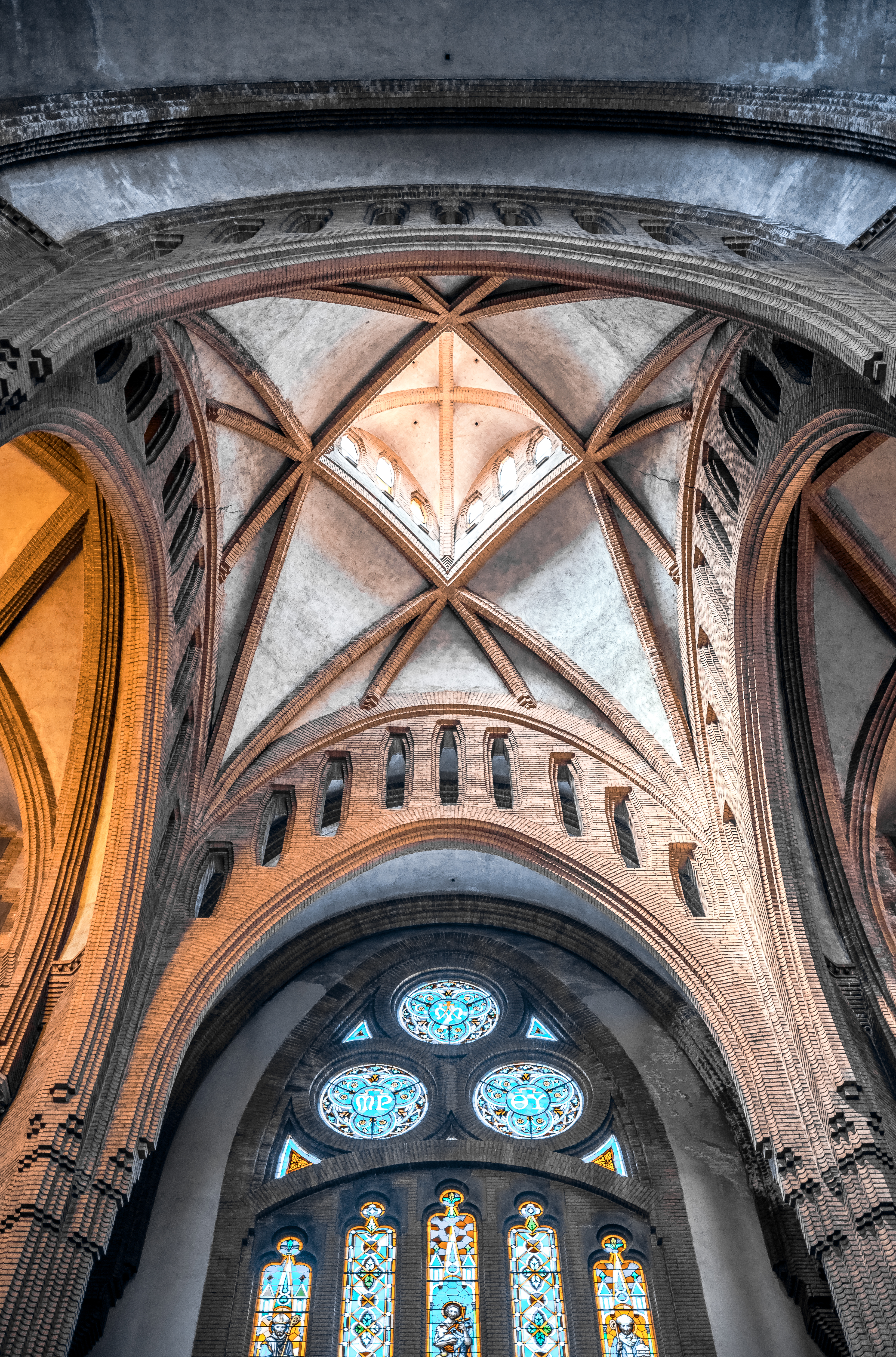 Podem veure el cimbori principal de l'esglèsia elevant-se fins als 40m sobre l'altar.